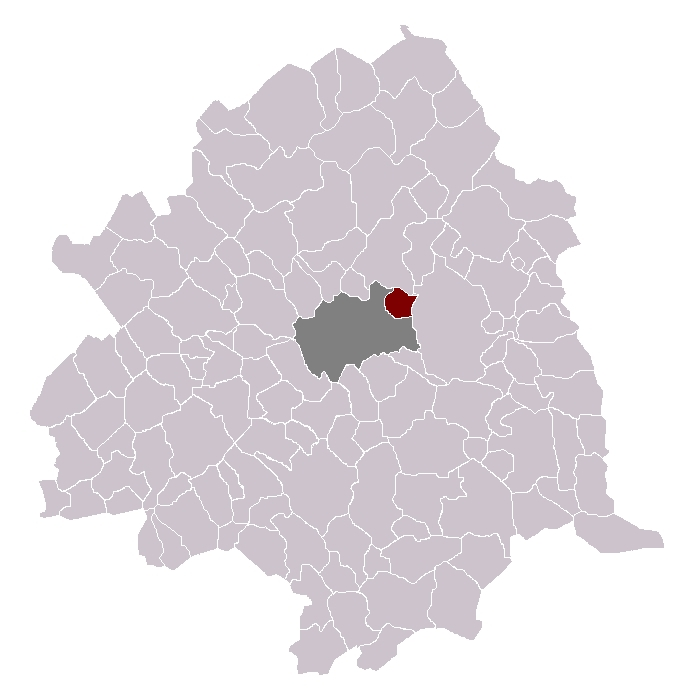 Mons-en-Baroeul dans son canton et son arrondissement.